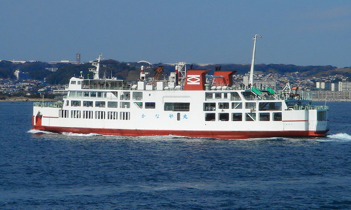 東京湾フェリー「かなや丸」 「くりはま丸」甲板上より撮影